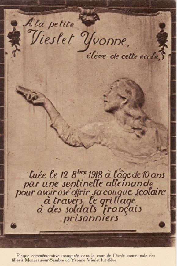 Stèle commémorative inaugurée en 1919- Yvonne Vieslet - Monceau-sur Sambre